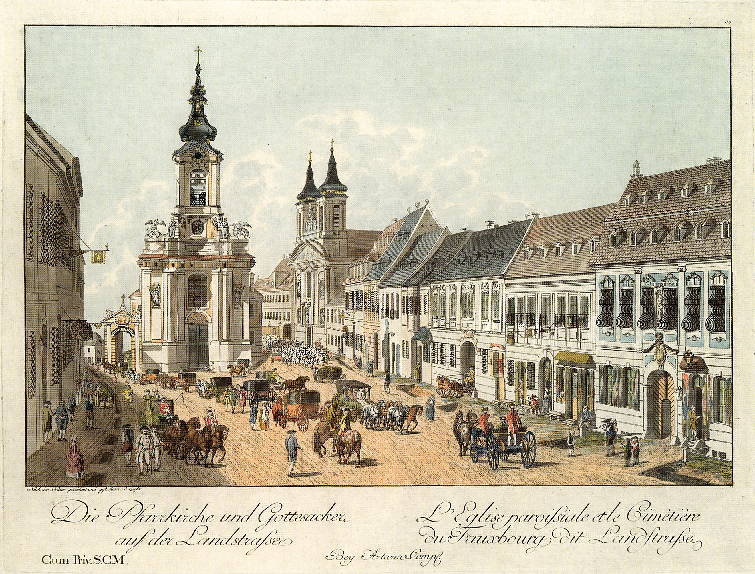 Ansicht der 1784 abgerissenen Nikolaikirche an der Stelle des heutigen Rochusmarktes in Wien-Landstraße: Blatt aus den Wien-Ansichten des Verlags Artaria von Johann Ziegler mit der Bezeichnung Die Pfarrkirche und Gottesacker auf der Landstraße.